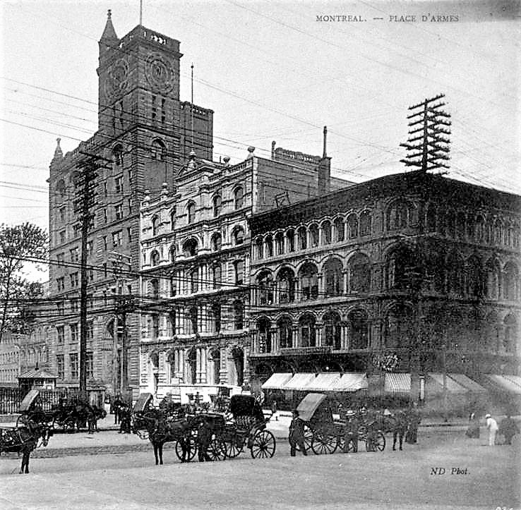 501-507, place d' Armes, Montréal Les anciens immeubles. Au milieu et à droite de la photo, l'immeuble de la Banque Jacques-Cartier et la librairie Granger et Frères, vers 1900. Ils seront remplacés par l'édifice Aldred. À gauche : édifice de la New York Life Insurance